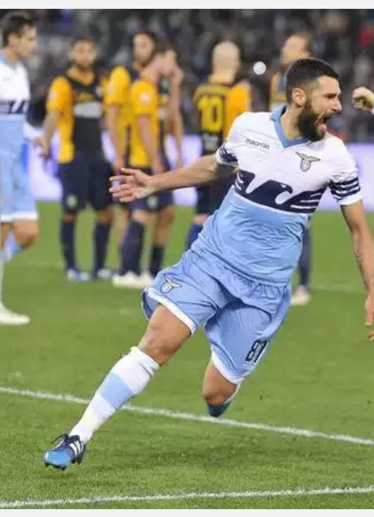 Antonio Candreva durante la partita Lazio-Verona della stagione 2014-15